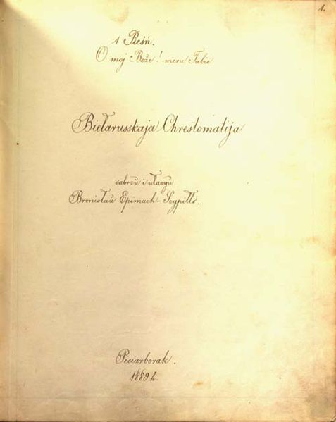 Браніслаў Ігнатавіч Эпімах-Шыпіла Тытульны ліст «Беларускай хрэстаматыі»